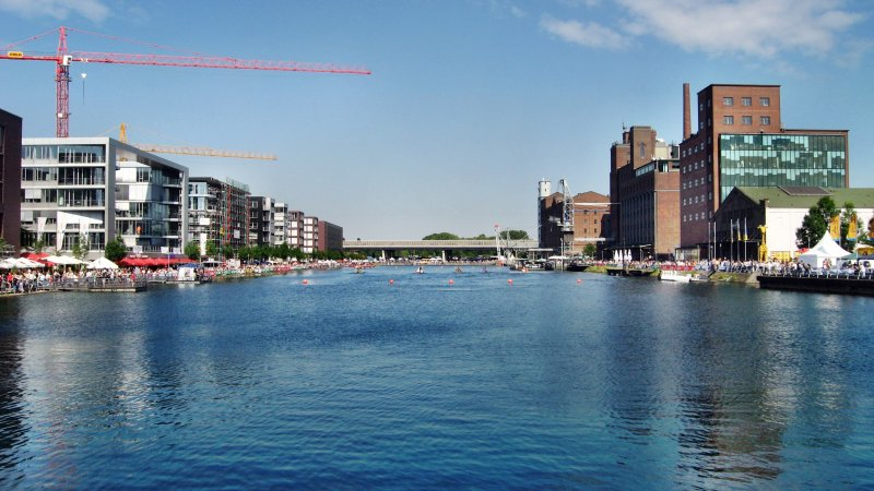 Blick über den Duisburger Innenhafen